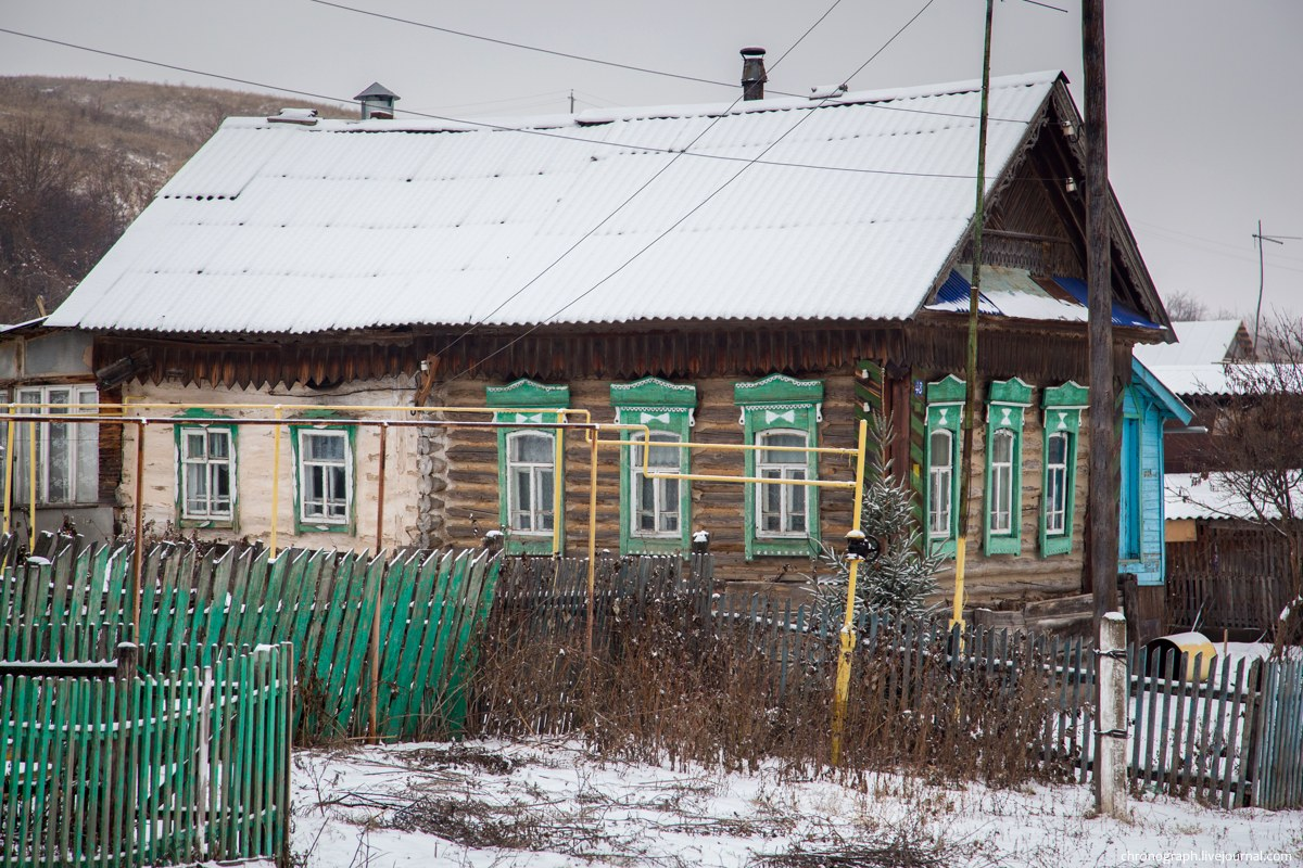 Жилой дом по улице Казачкова, Винновка, Самарская область